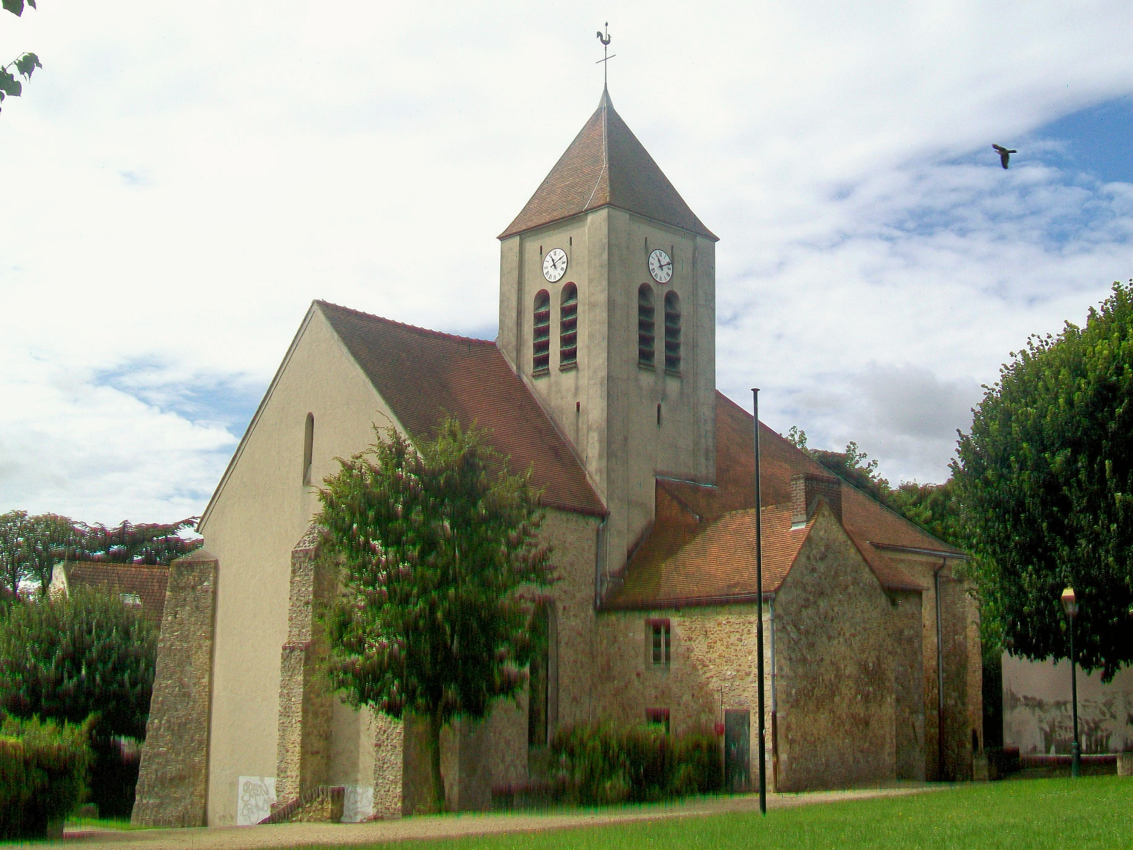 L'église Saint-Sulpice depuis le nord-est (jardin public).